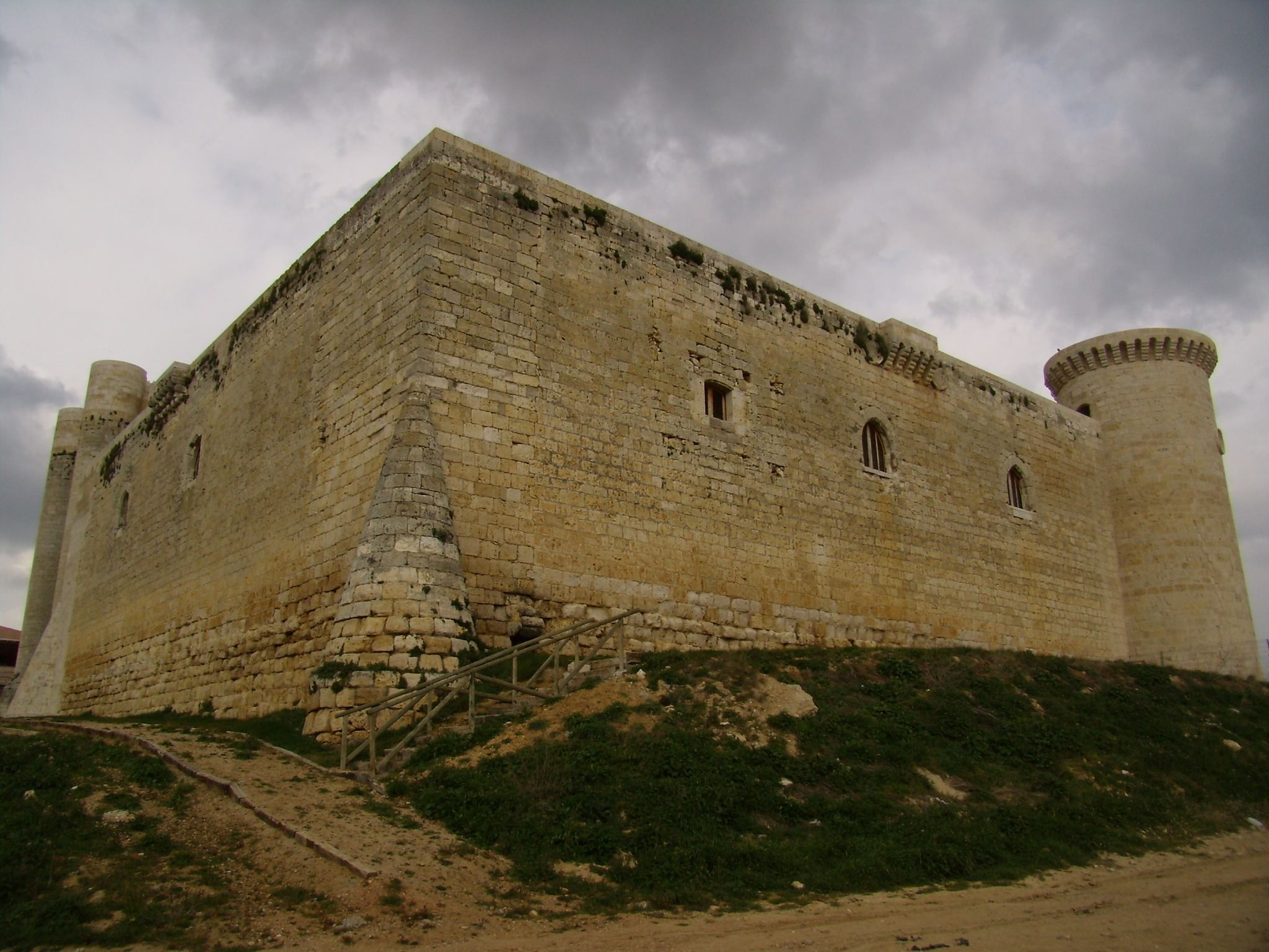 Castillo de Fuentes de Valdepero (Palencia, España).